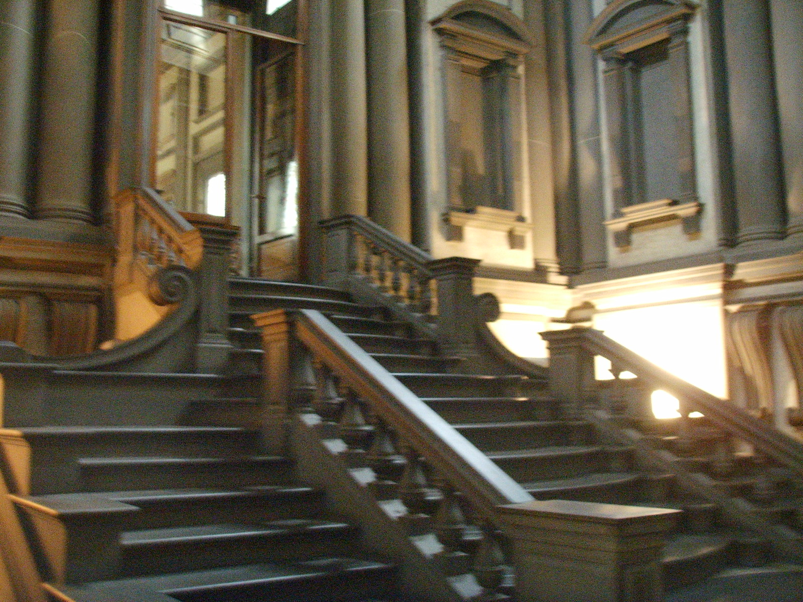 Biblioteca medicea laurenziana scalone di michelangelo